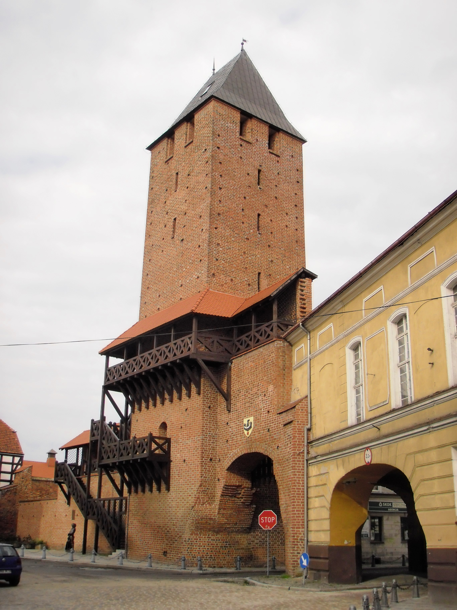 Namysłów, Brama Krakowska, 1390, XIX